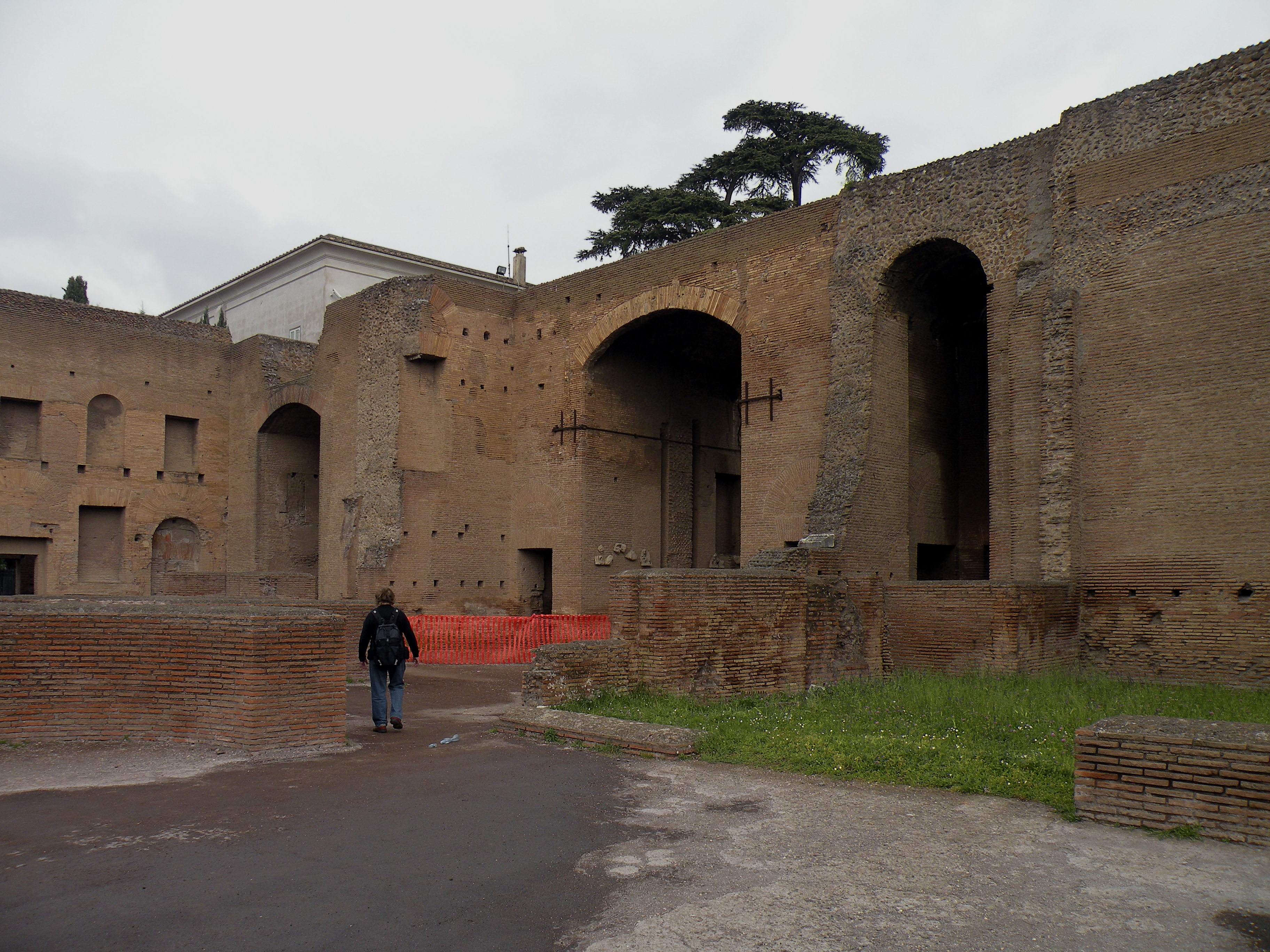 Палатин.Дворец Августов